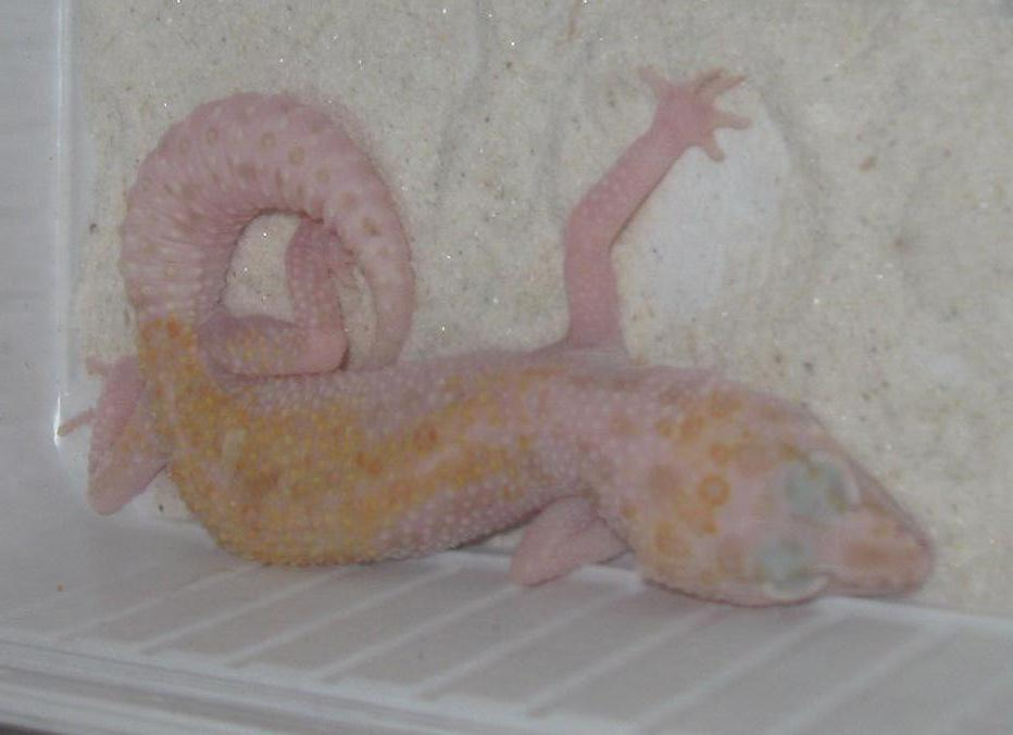 Leopárdgekkó, Dreamsickle színváltozat